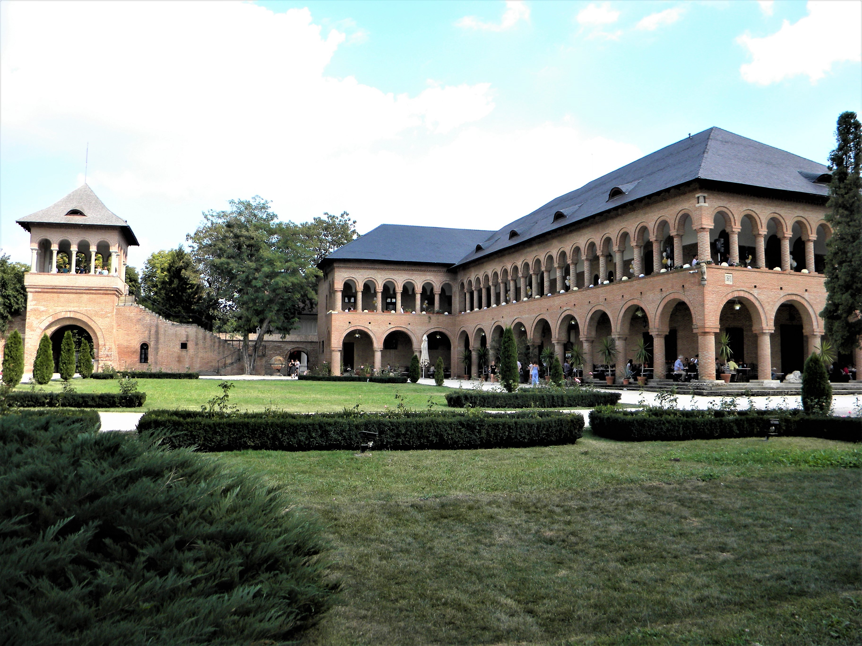 Bucuresti, Romania. PALATUL MOGOSOAIA. Casa de oaspeti si Turnul de veghe. (IF-II-a-A-15298). Palatul Mogoşoaia este o clădire istorică din localitatea Mogoşoaia, judeţul Ilfov, România, aflată la circa 15 km de centrul oraşului Bucureşti. Complexul conţine clădirea propriu-zisă, curtea acestuia cu turnul de veghe, cuhnia (bucătăria), casa de oaspeţi, gheţăria şi cavoul familiei Bibescu, precum şi biserica „Sfântul Gheorghe” aflată lângă zidurile curţii. Palatul poartă numele văduvei boierului Mogoş care deţinea pământul pe care a fost construit. Palatul Mogoşoaia a fost în posesia familiei Brâncoveanu timp de aproximativ 119 de ani, trecând apoi în proprietatea familiei Bibescu. Palatul a fost construit până în 1702 de către Constantin Brâncoveanu în stil brâncovenesc. Lucrarea a fost terminată în ziua de 20 septembrie 1702.